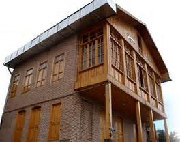 موزه ی شهرستان نمین که در مرکز این شهر یعنی میدان شهدا واقع شده است ، این موزه قبلا منزل یکی از خوانین این شهر و سپس مقر فرماندهی نیروی انتظامی شهرستان بود که با کمک سازمان میراث فرهنگی مرمت و به موزه ی تاریخی تبدیل شد.